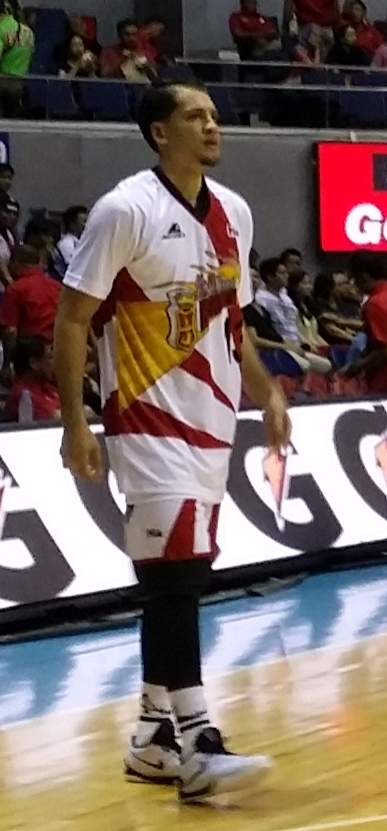 PBA - Rain or Shine vs San Miguel - Marcio Lassiter-San Miguel - 2016-0107